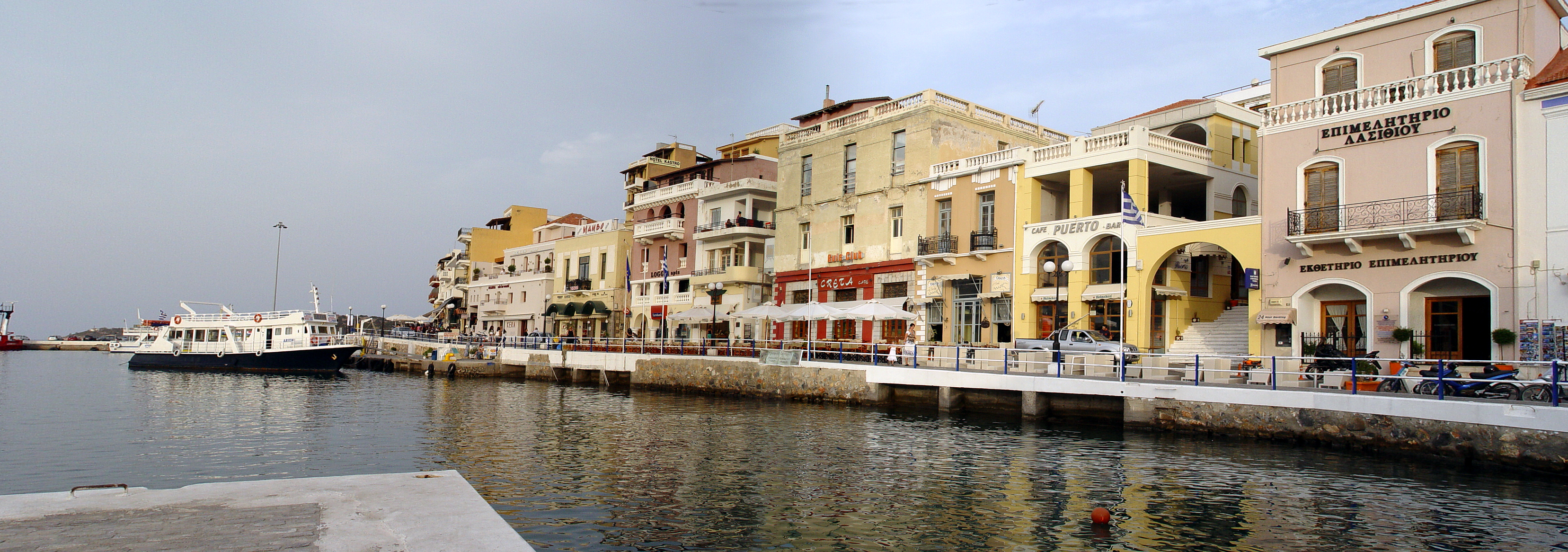 Hafenfassade in Agios Nikólaos.